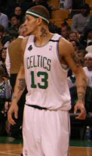 Delonte West, Boston Celtics